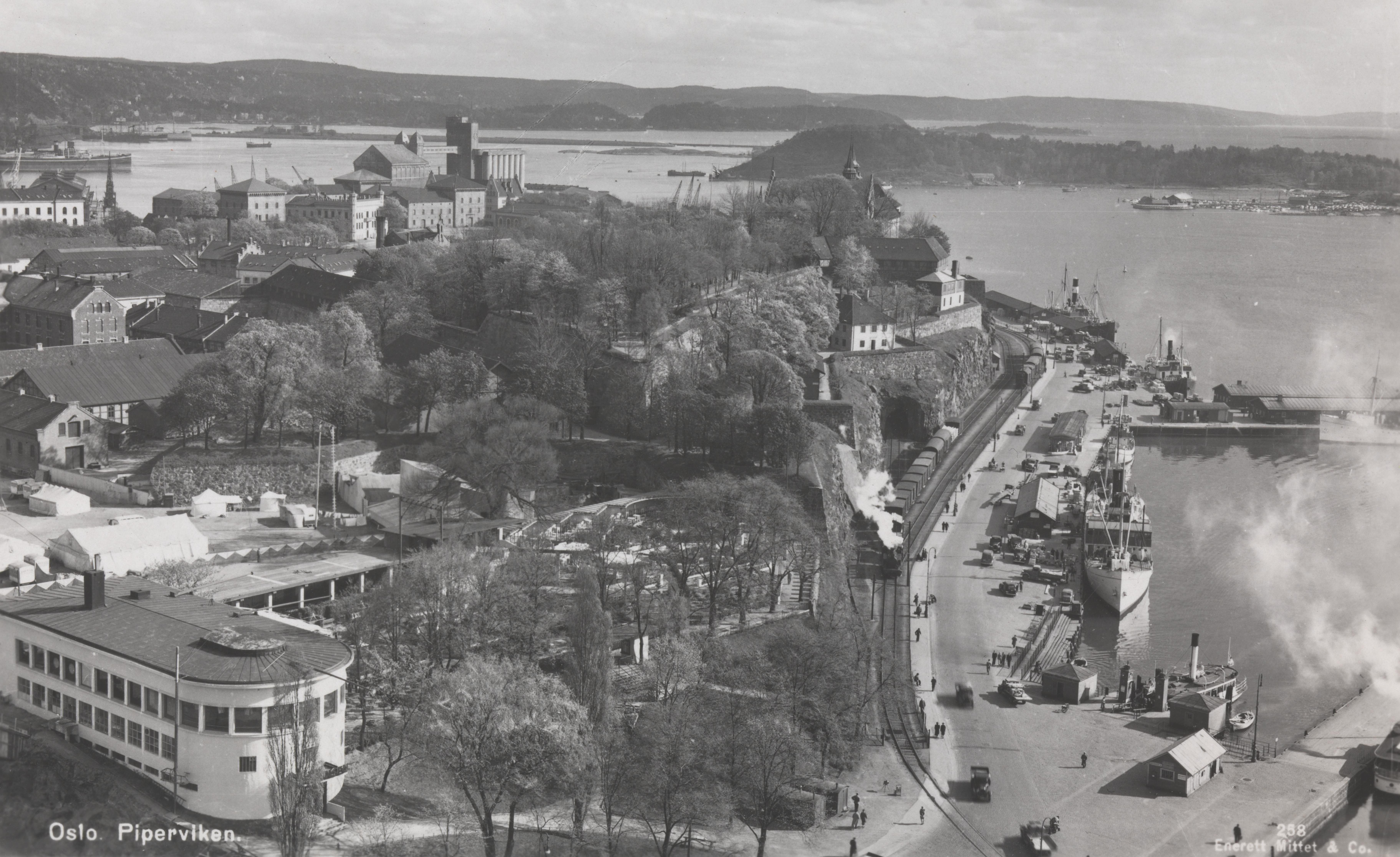 Bildet er hentet fra Nasjonalbibliotekets bildesamling Akershus festning,Pipervika, Oslo, Oslo